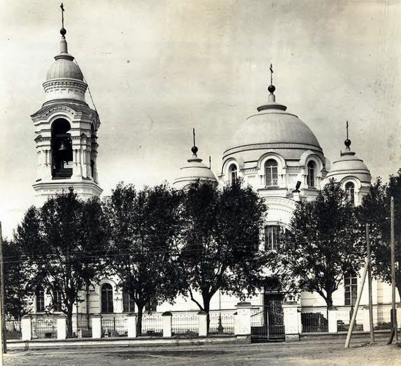 Нижний Тагил. Церковь Введения во храм Пресвятой Богородицы